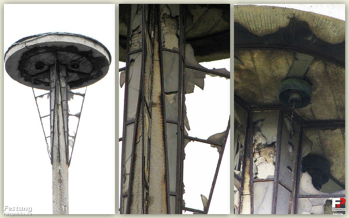 Zbliżenie na modernistyczne latarnie oświetlające nieistniejący Horst Wesselplatz, który znajdował się po obecnej, polskiej stronie przeciętego graniczną Nysą miasta Forst, czyli w dzisiejszych Zasiekach. Plac na przedwojennej widokówce jest tu. Widać, że używano żarówek z gwintem typu "goliat". Zdjęcie to dedykuję kol. Wito.